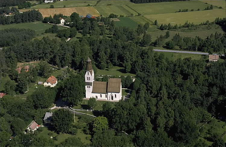 Motiv: Lye kyrka Nyckelord: Flygbilder, Riksintressen Kategori: KyrkomiljöLye kyrka